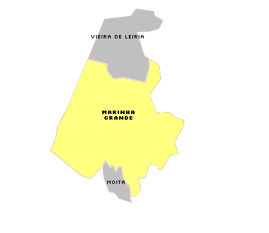 localisation de marinha grande sur la freguesia de marinha grande